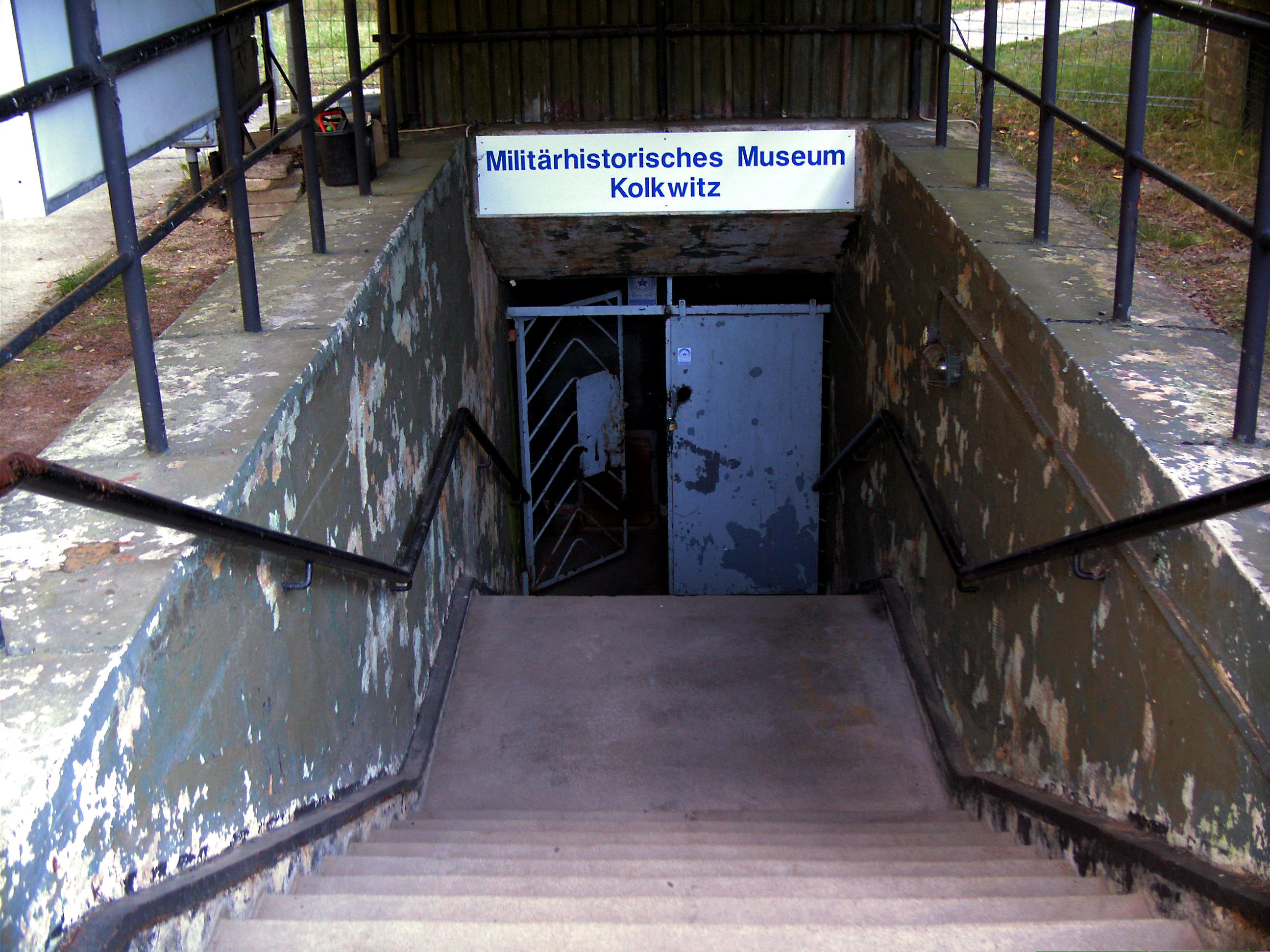 Gefechtsstand 1. LVD, hier: Eingang in den Bunker Kolkwitz